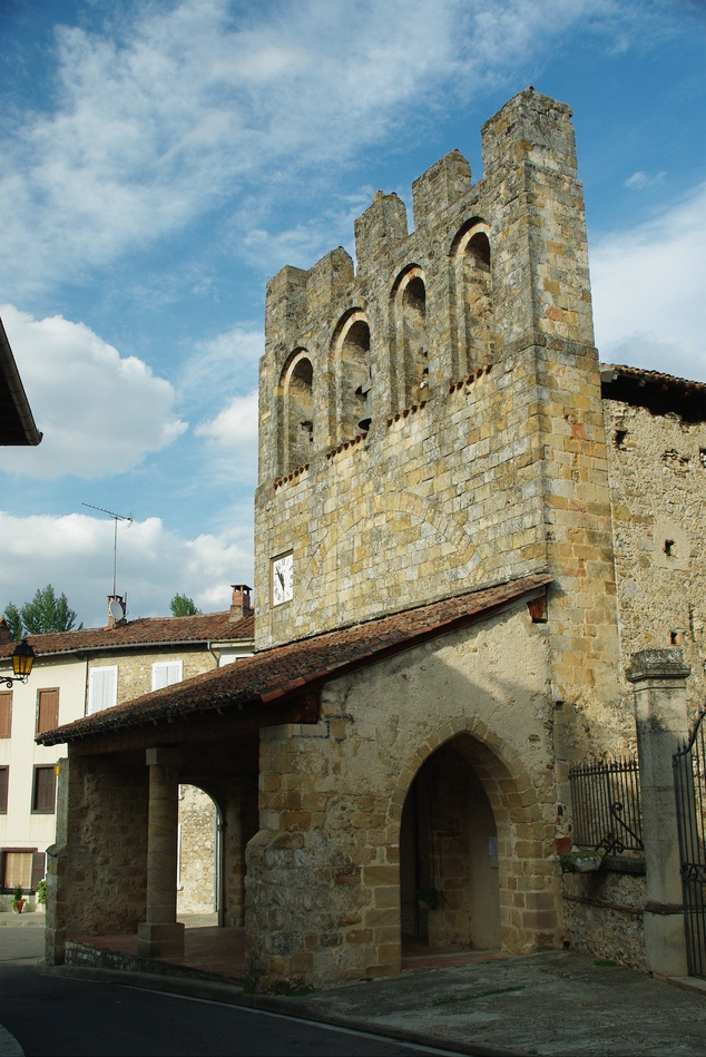 Église Saint-Jean de Montbrun-Bocage